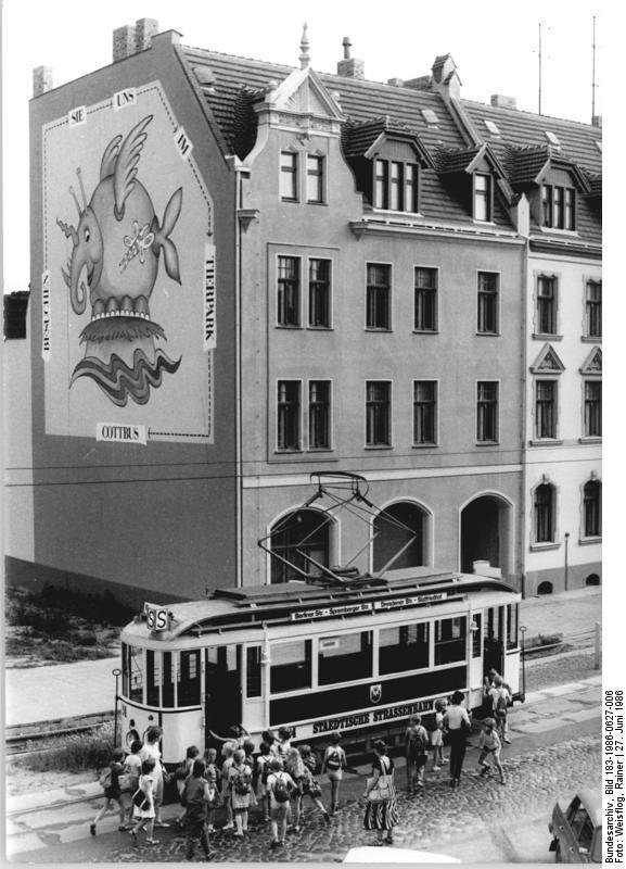 Cottbus, Straßenbahn ADN-ZB Weißflog 27.6.68 Cottbus: Traditionsbahn-Seit kurzem kommt in Cottbus wieder diese alte Straßenbahn aus dem Jahre 1926 zu Ehren. Die Arbeitsgemeinschaft "Nahverkehr Cottbus" des Deutschen Modelleisenbahnverbandes der DDR hat ihn wieder in den Originalzustand versetzt. Sonderfahrten wie diese von Schülern zum Schuljahresausklang werden von den Bewohnern der Bezirksstadt gern genutzt. Haltestelle Schweriner Straße, Linie 3